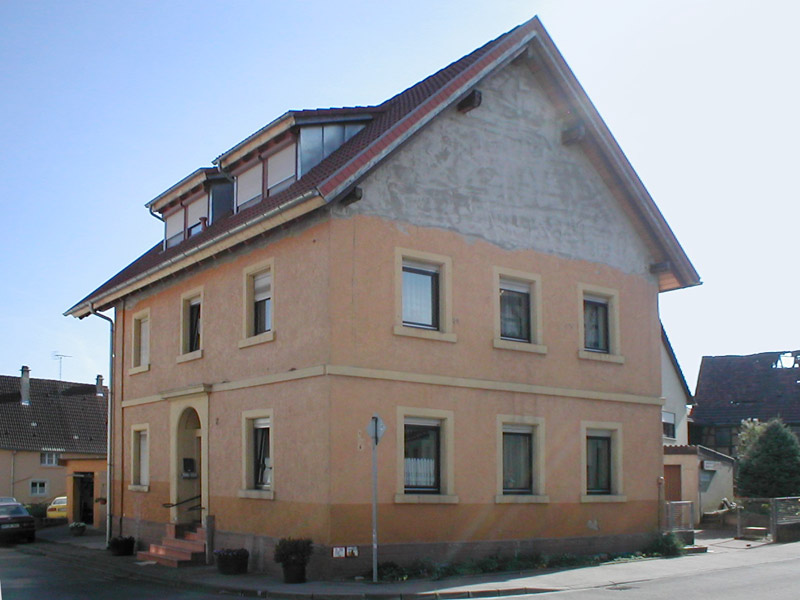 Alte Judenschule in Kirchardt-Berwangen, heute Wohnhaus. Links neben dem Gebäude befand sich einst die Synagoge.